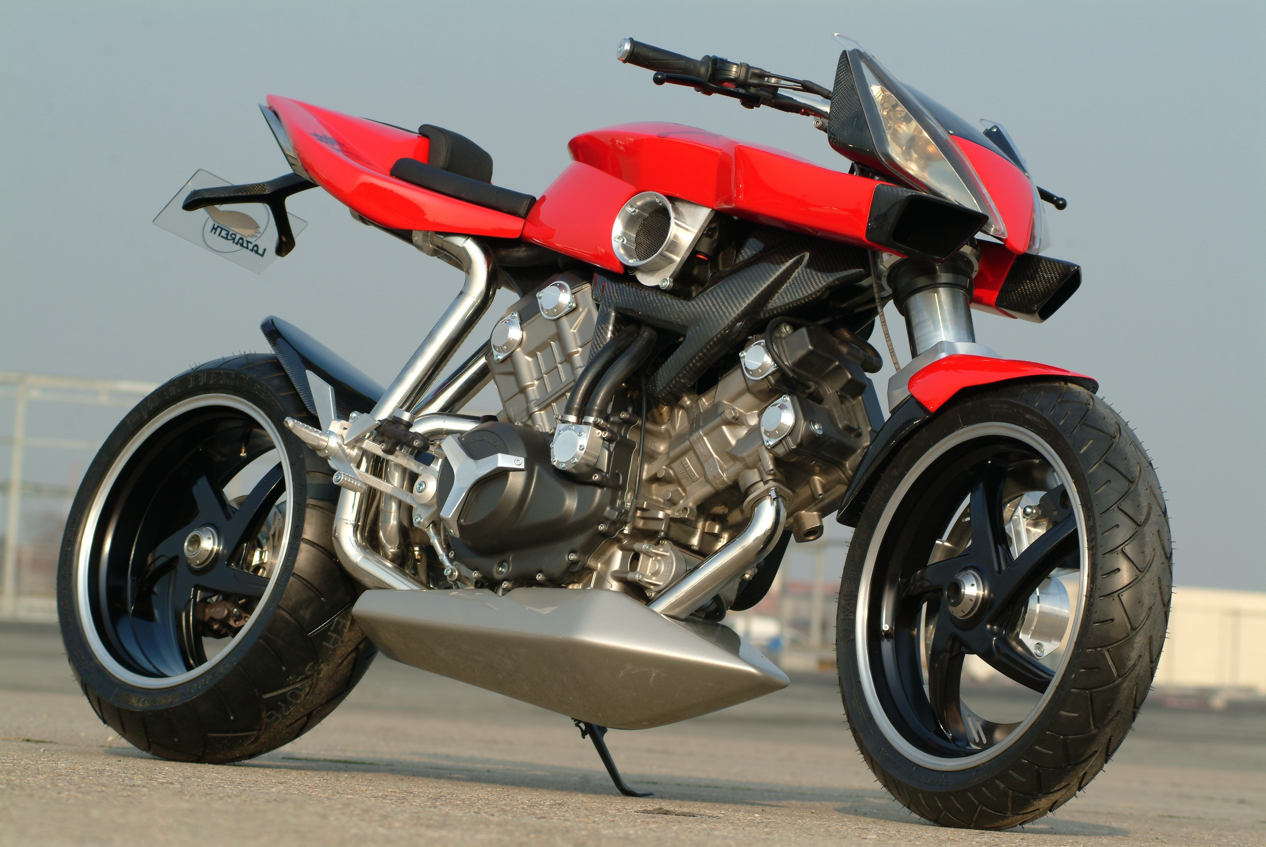 Lazareth Honda VTR 1000 - Paris Tuning Show 2006